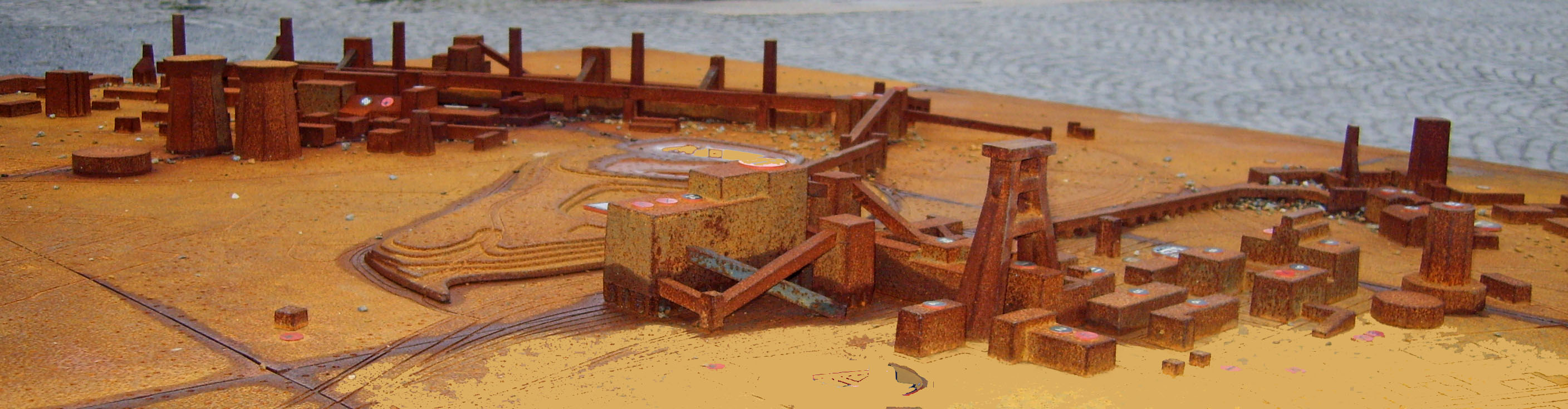 Modell der Zeche Zollverein